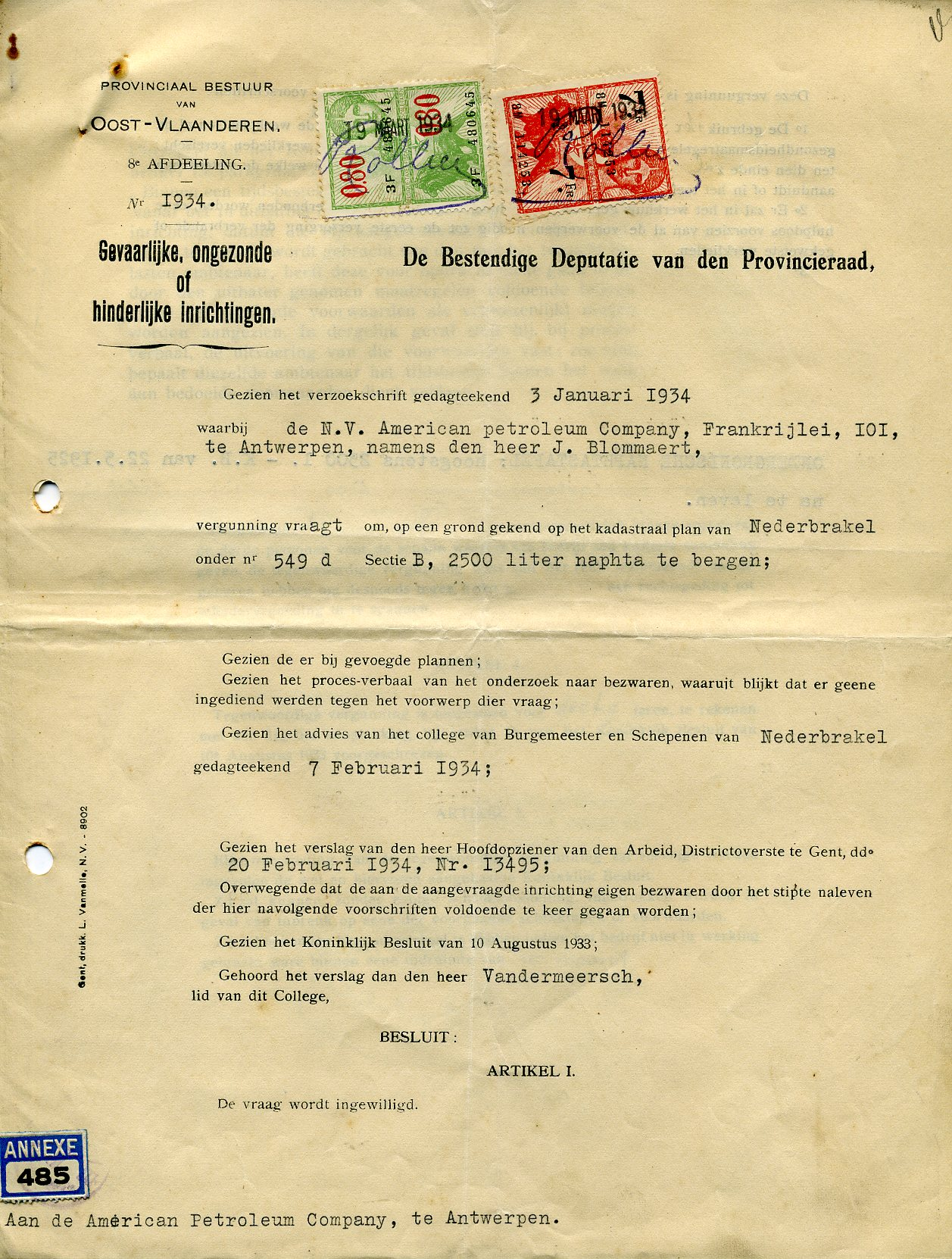 Autorisation to lodge a tank by the "Bestendige Deputatie van de Provincieraad" van Oost-Vlaanderen ( België)